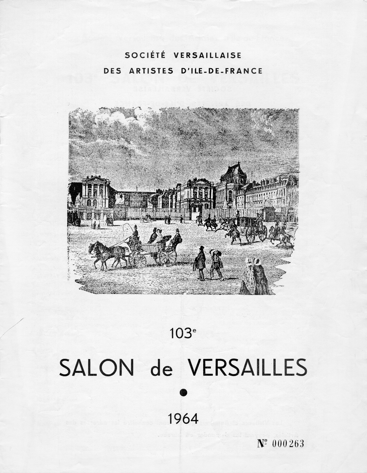 копия каталога салон Общества версальских художников. 1964